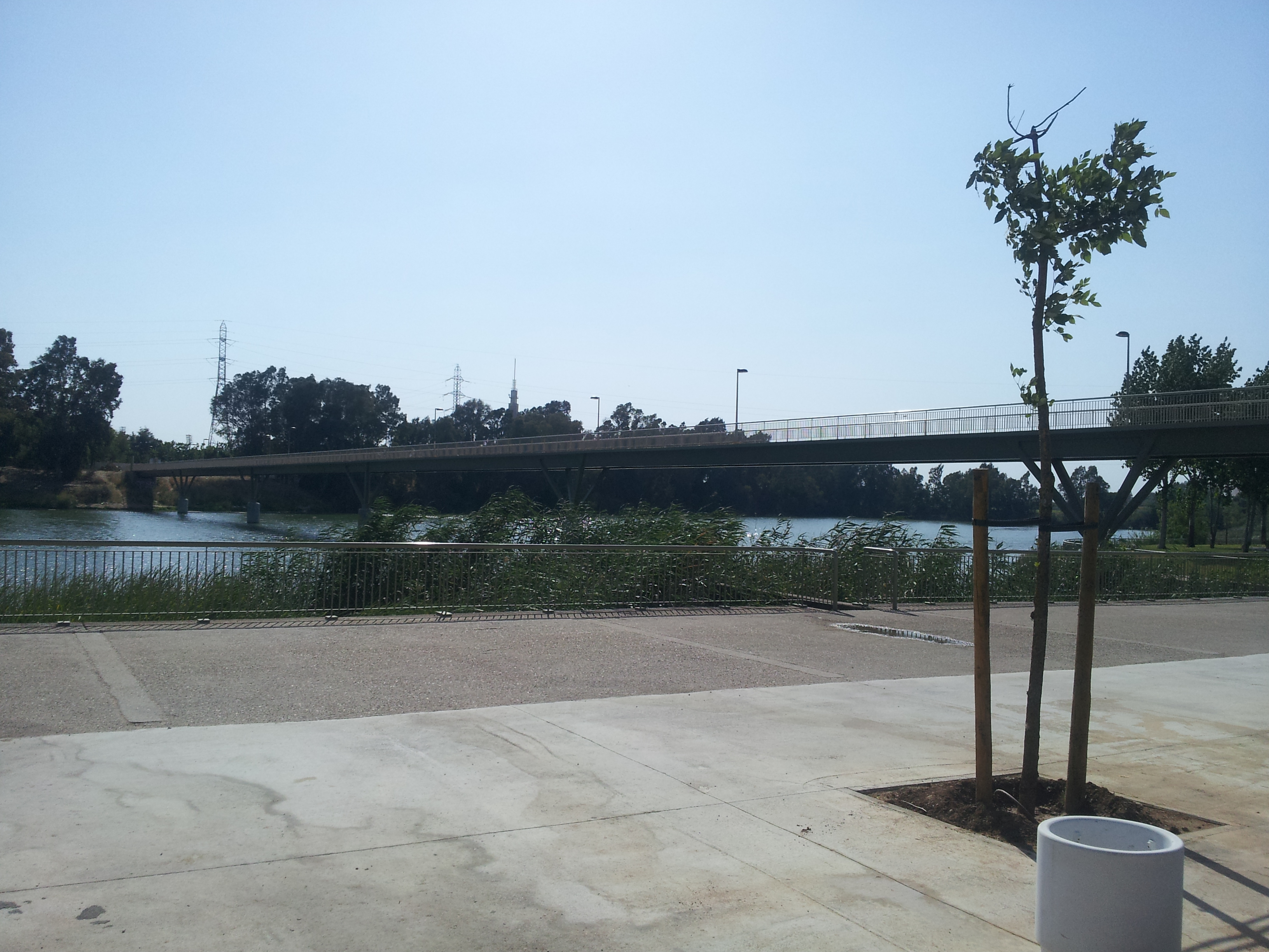 Pasarela de San Jerónimo entre el parque del mismo nombre y el parque del Alamillo, en Sevilla